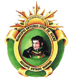 Escudo del municipio Antonio José de Sucre, estado Barinas, Venezuela